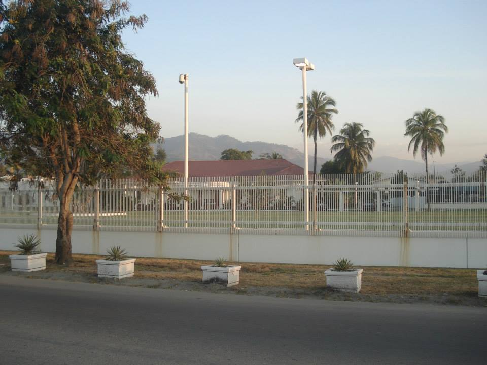 Dili